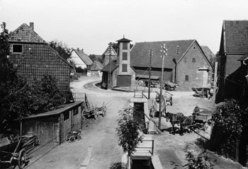 Feuerwehrplatz von 1920 mit Spritzenhaus